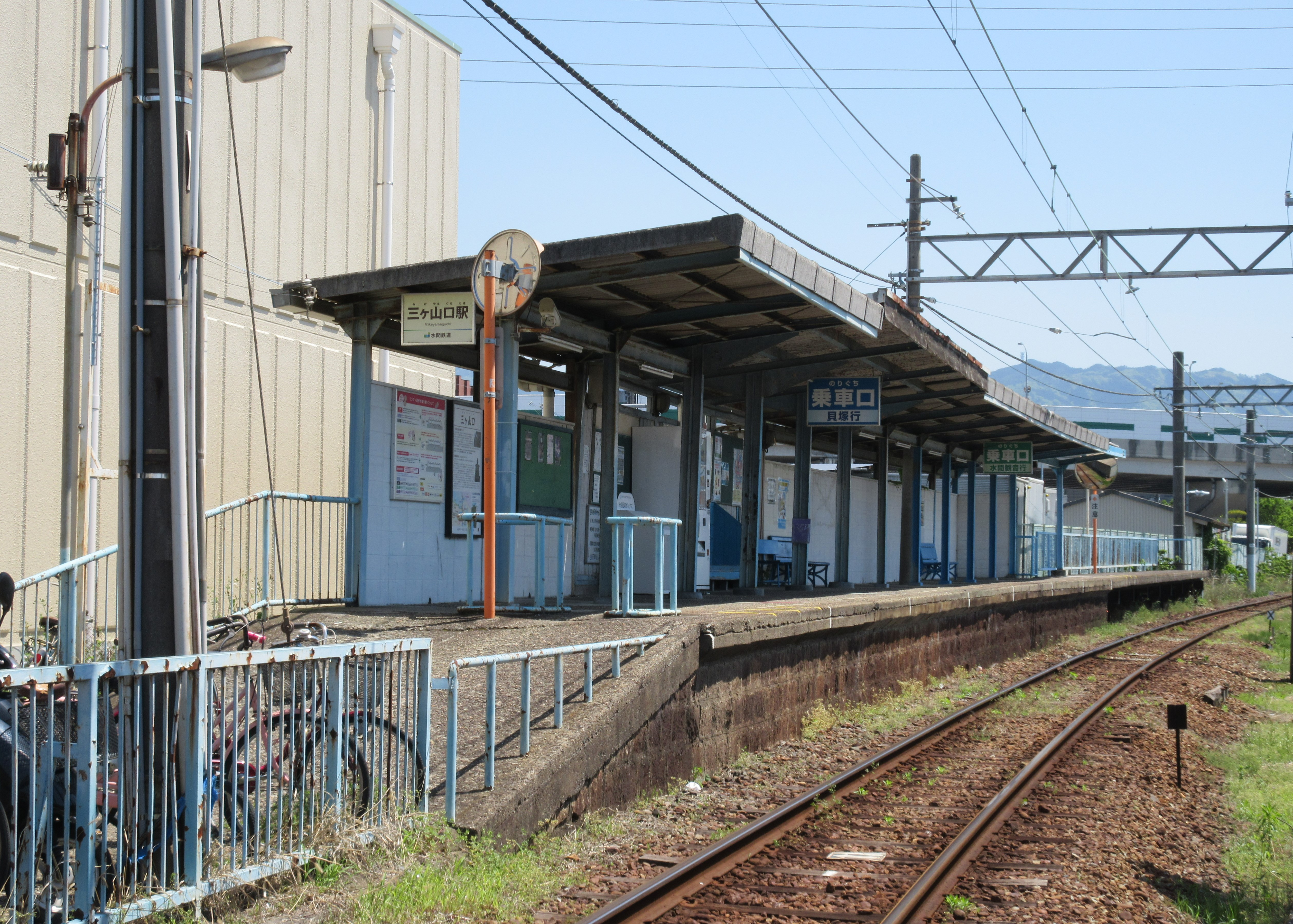 水間鉄道三ヶ山口駅